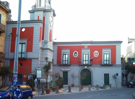 Casandrino